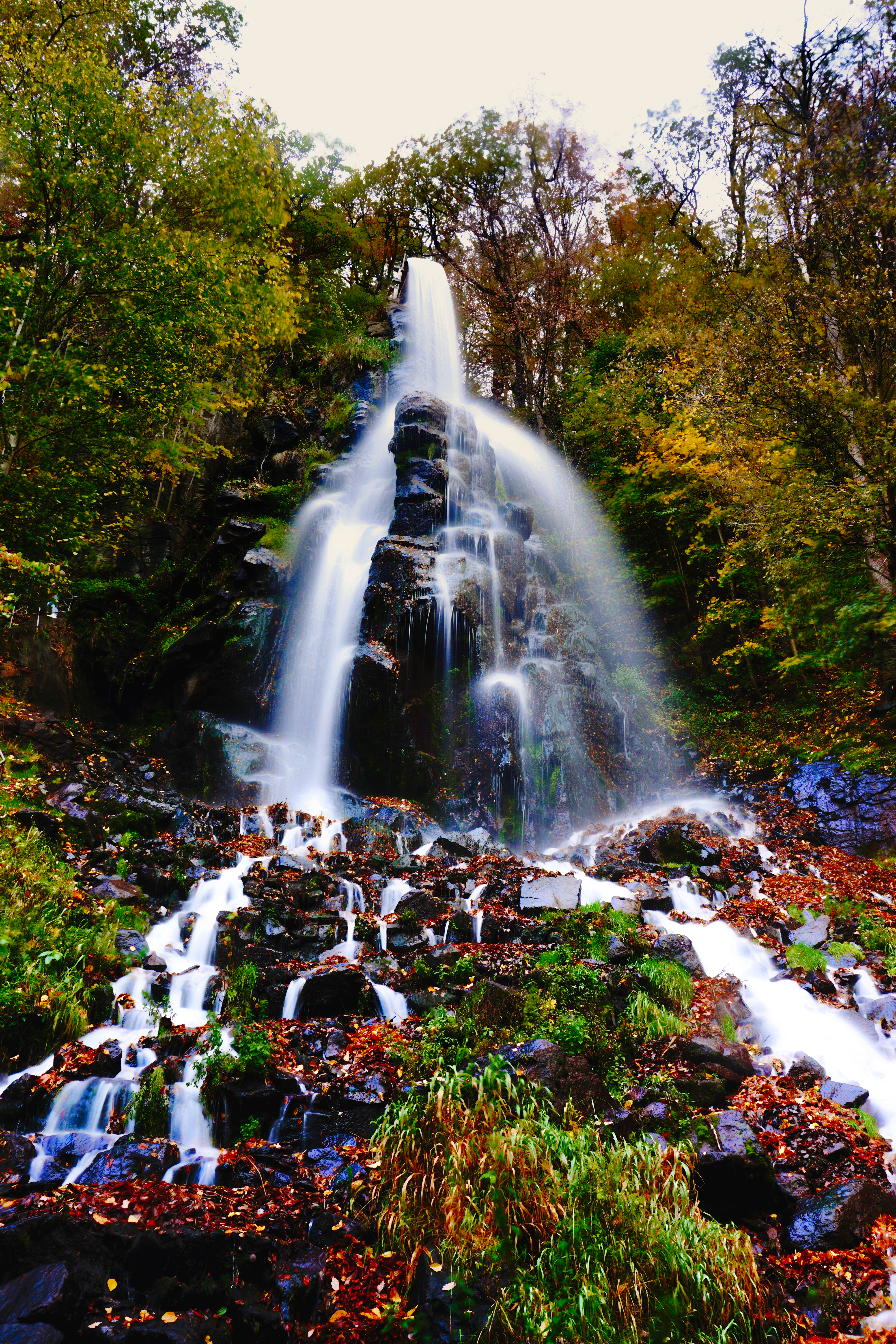 Trusetaler Wasserfall, Oktober 2019